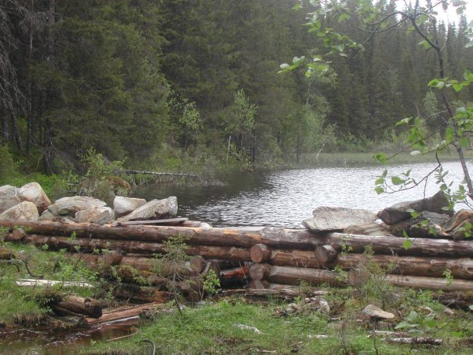 Tømmerkistedam i Vefsn